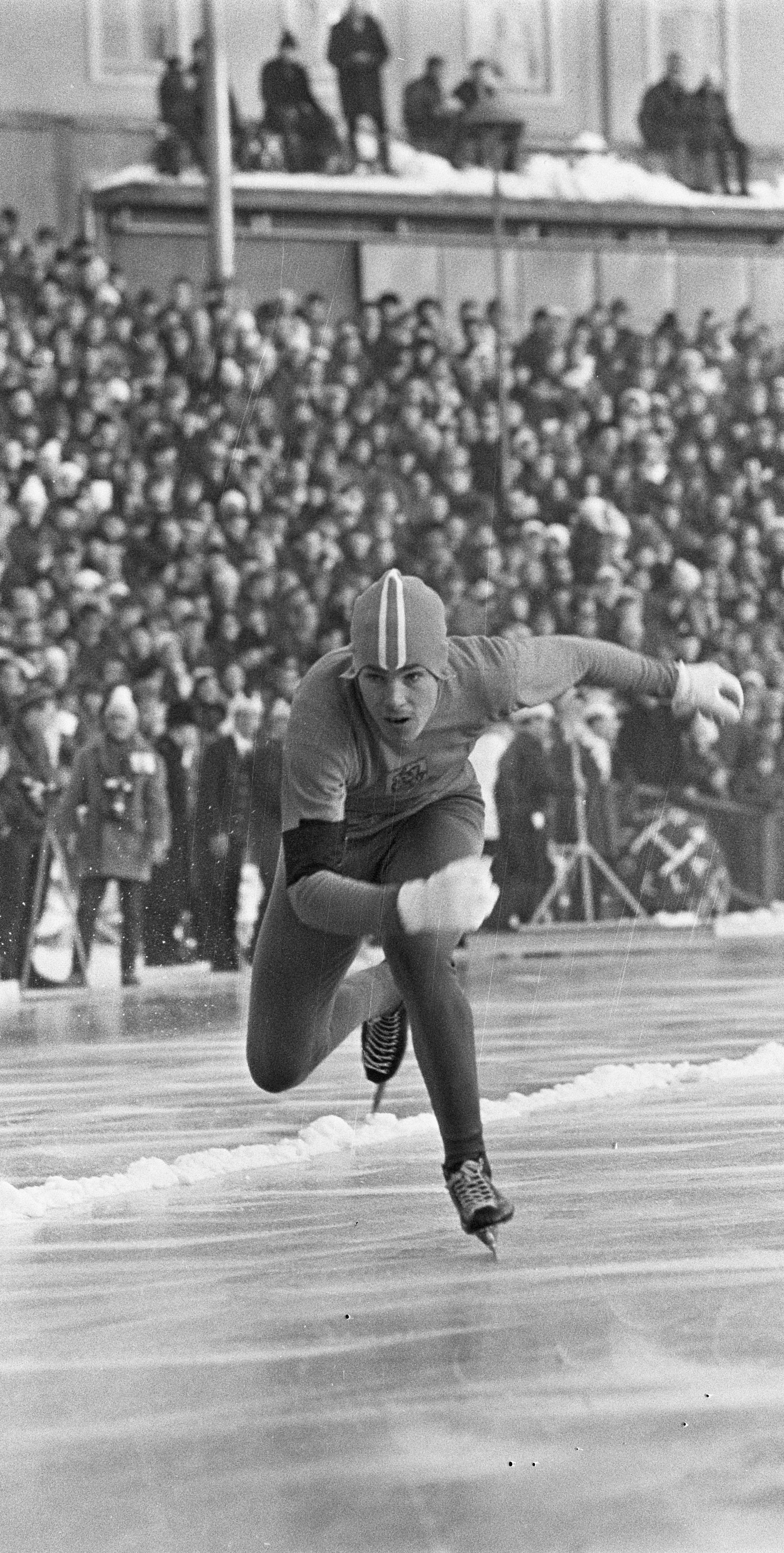 Wereldkampioenschappen schaatsen heren allround in Oslo. Rudi Liebrechts in aktie.